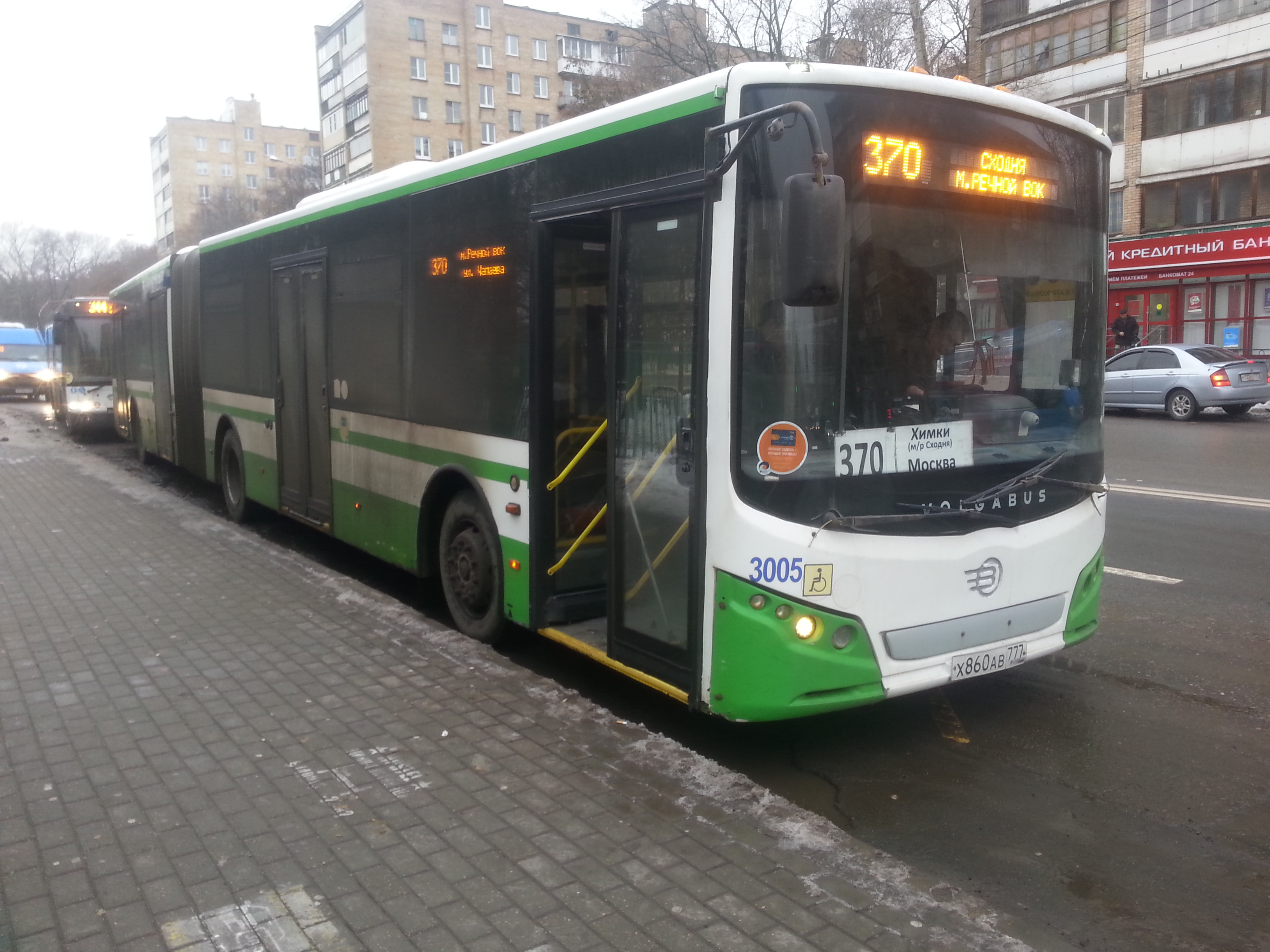 Volgabus-6271.00 3005 у Речного вокзала